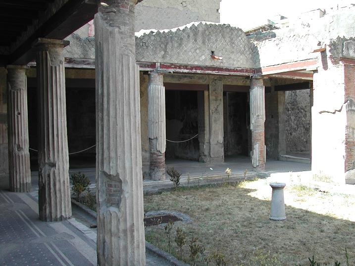 Casa del Salone Nero foto di Aldo Ardetti (14 agosto 2007)